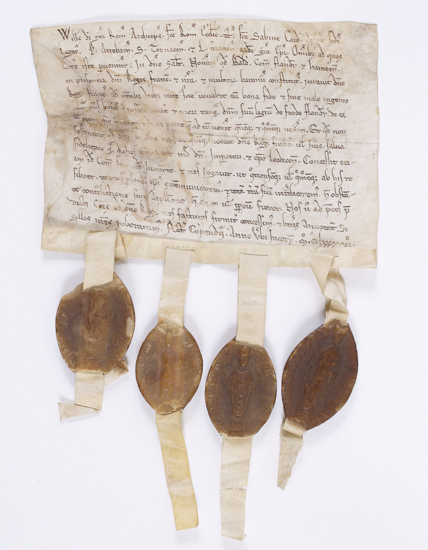 Charte de Guillaume de Champagne, archevêque de Reims et de trois autres prélats attestent que le comte de Flandre a prêté hommage au roi Philippe Auguste pour son comté. Acte scellé de quatre sceaux pendants sur queues de parchemin, fait à Compiègne.